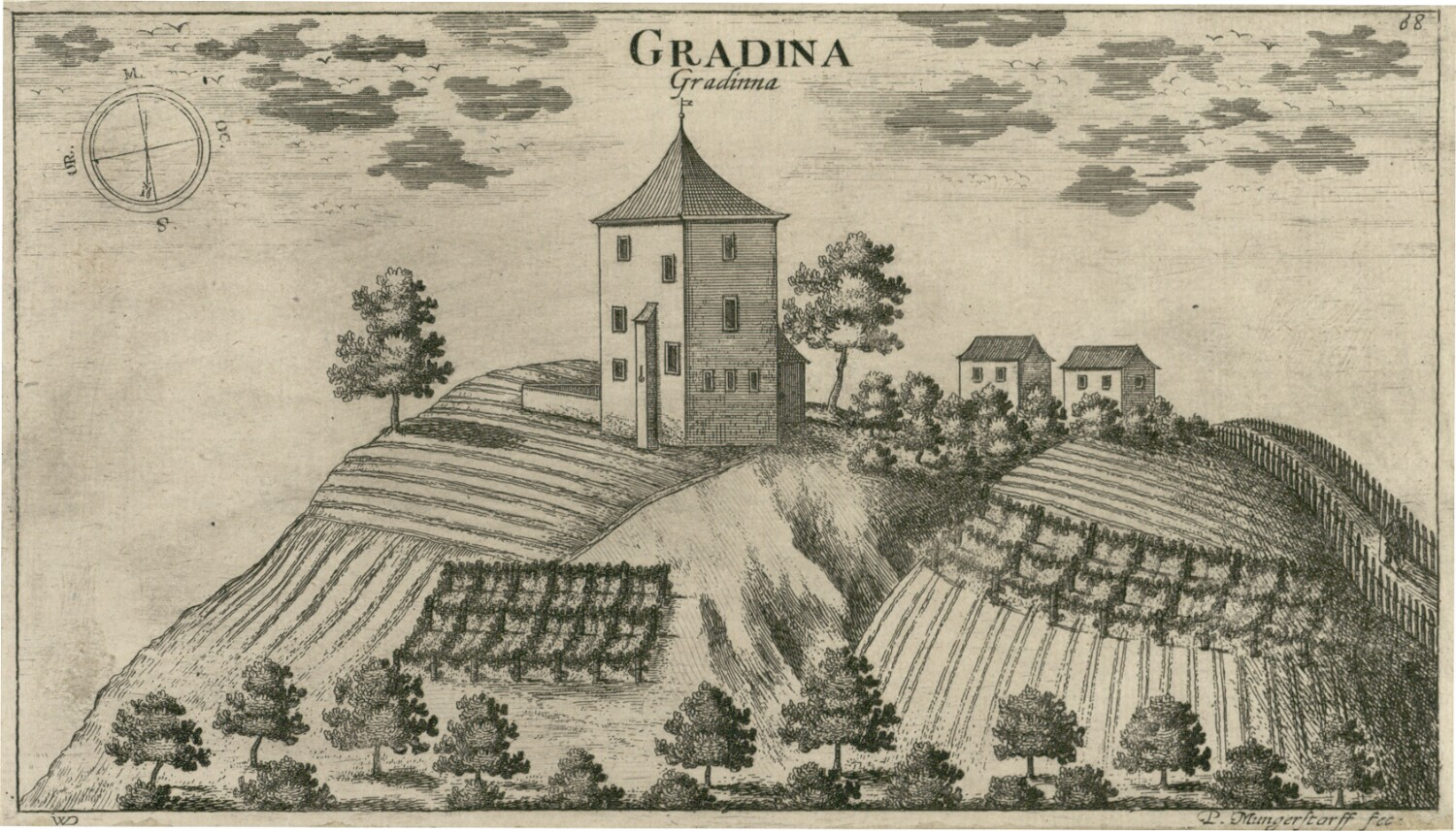 Gradina